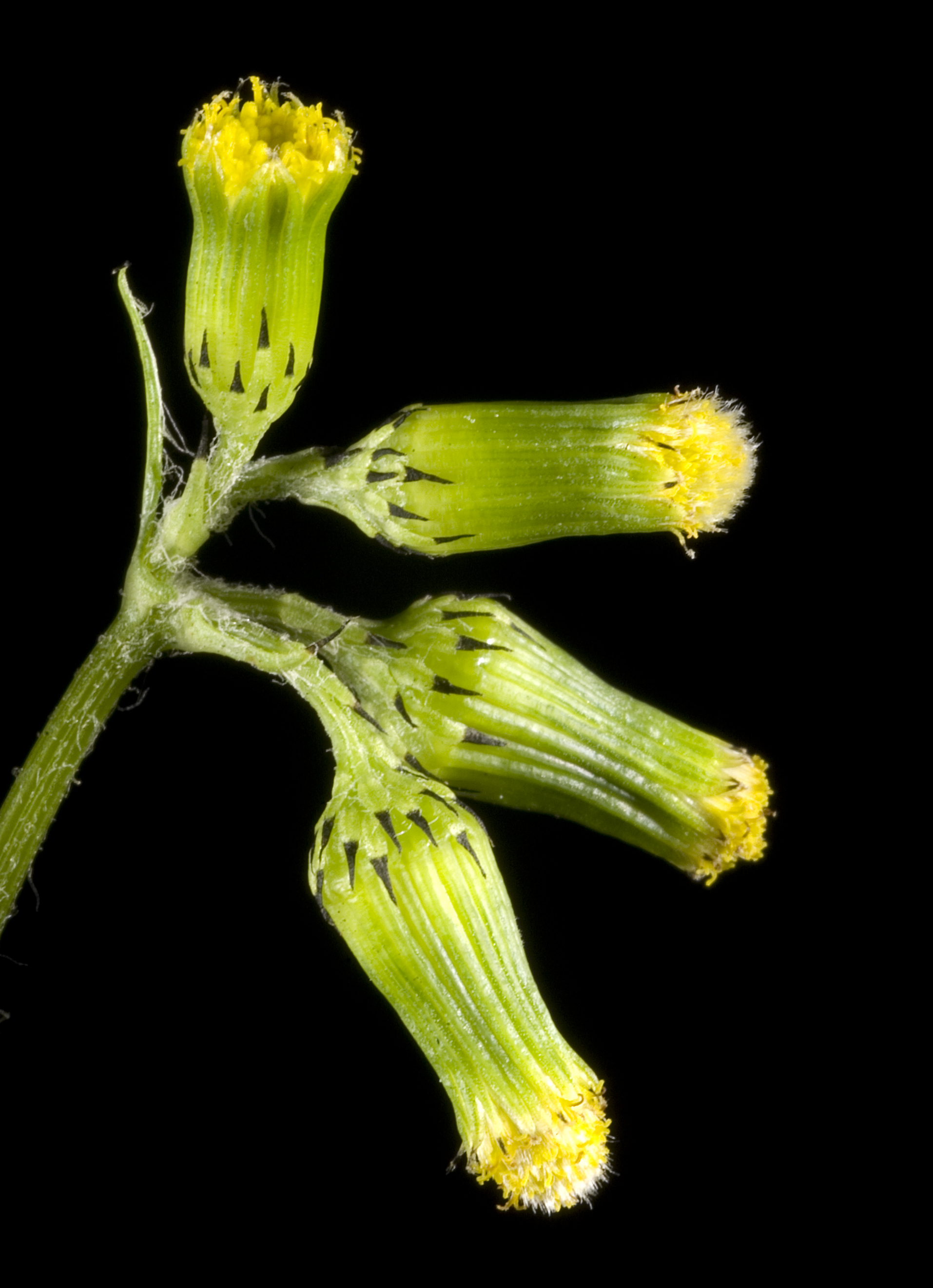 KRT3331